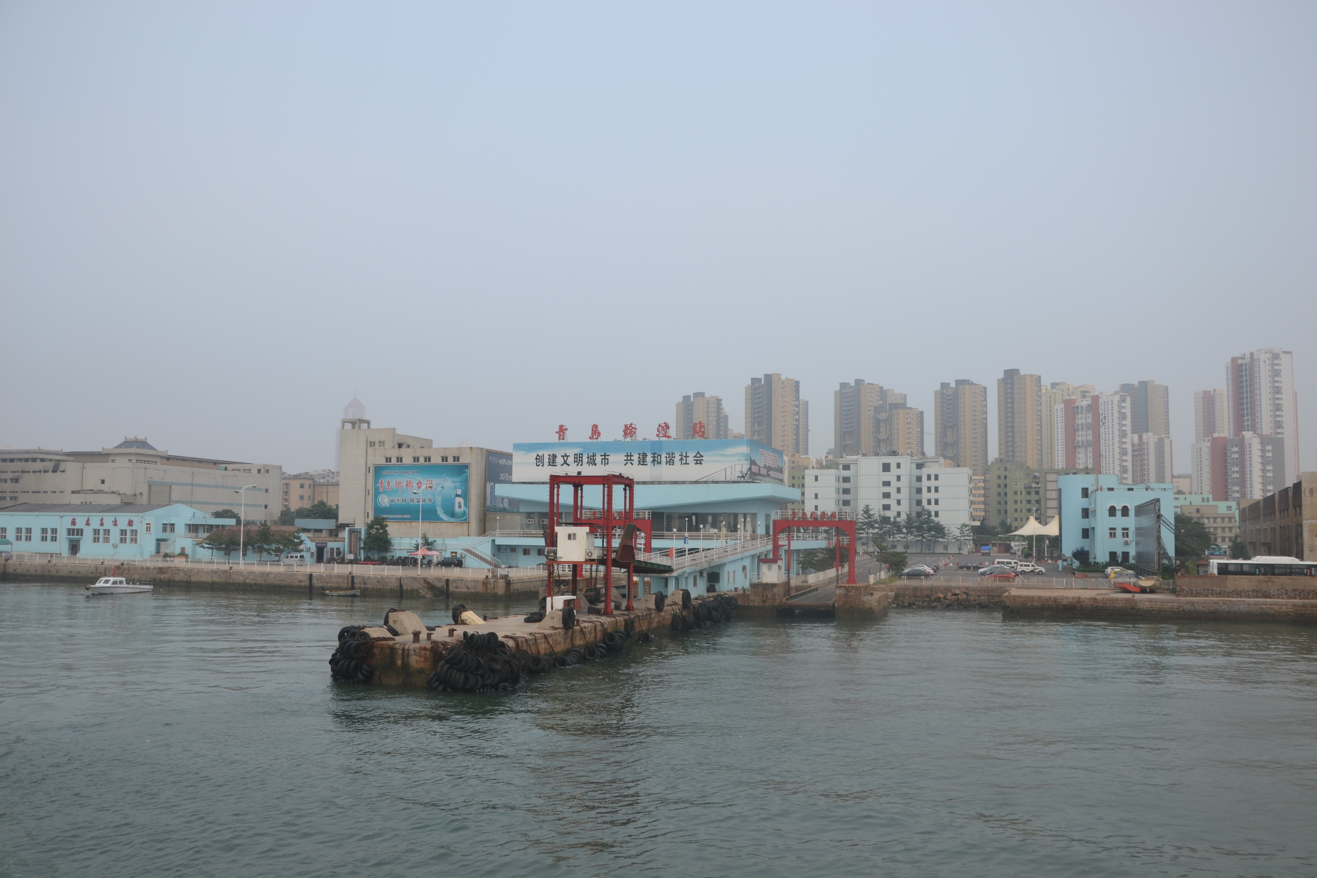 青岛轮渡码头